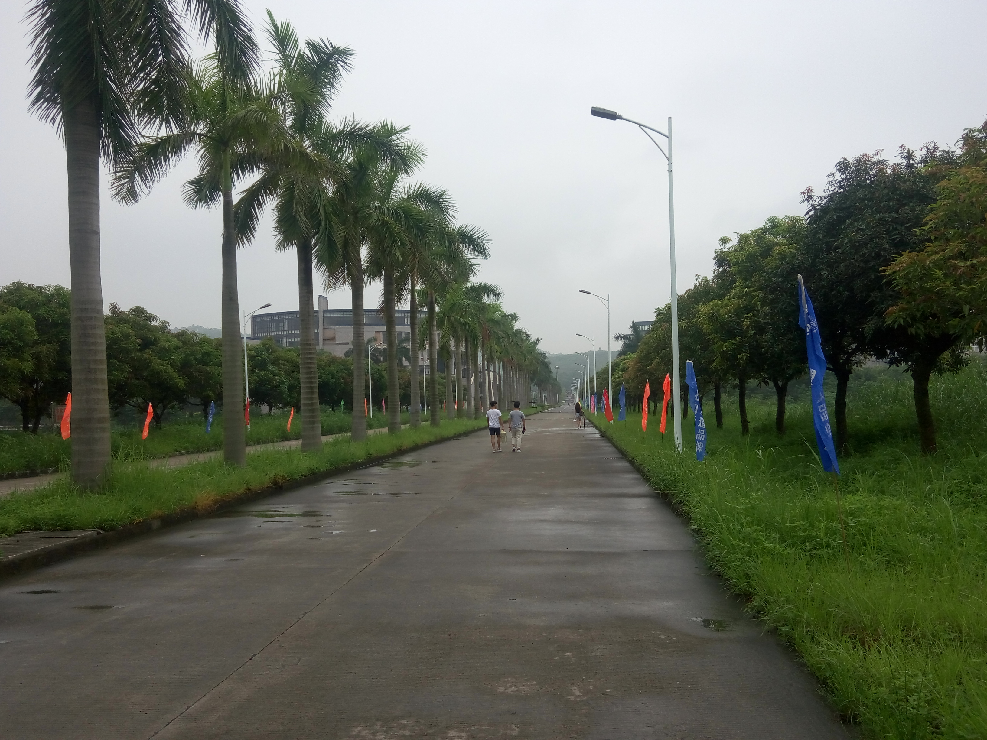 中文（中国大陆）: 广东南华工商职业学院博雅大道